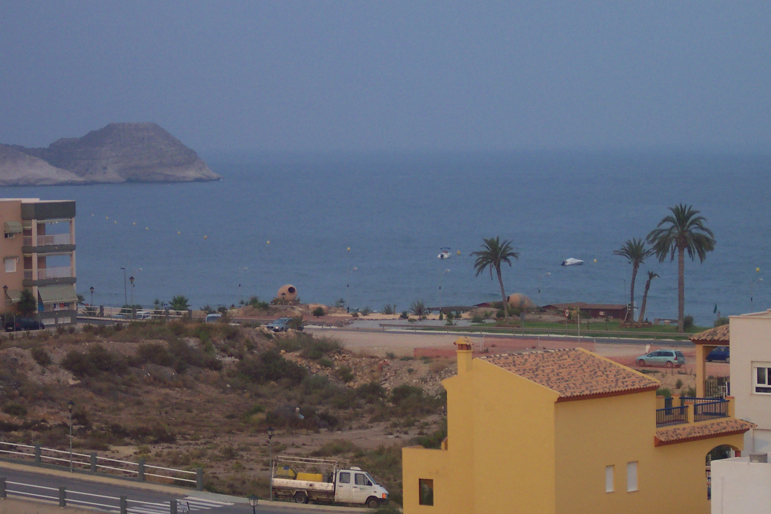 Vista de una playa de San Juan de los Terreros, Pulpí, provincia de Almería.